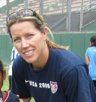 Gregg y Cromwell hacen una pausa y se sacan una foto con una joven promesa del fútbol femenino en Tilcara, Jujuy.